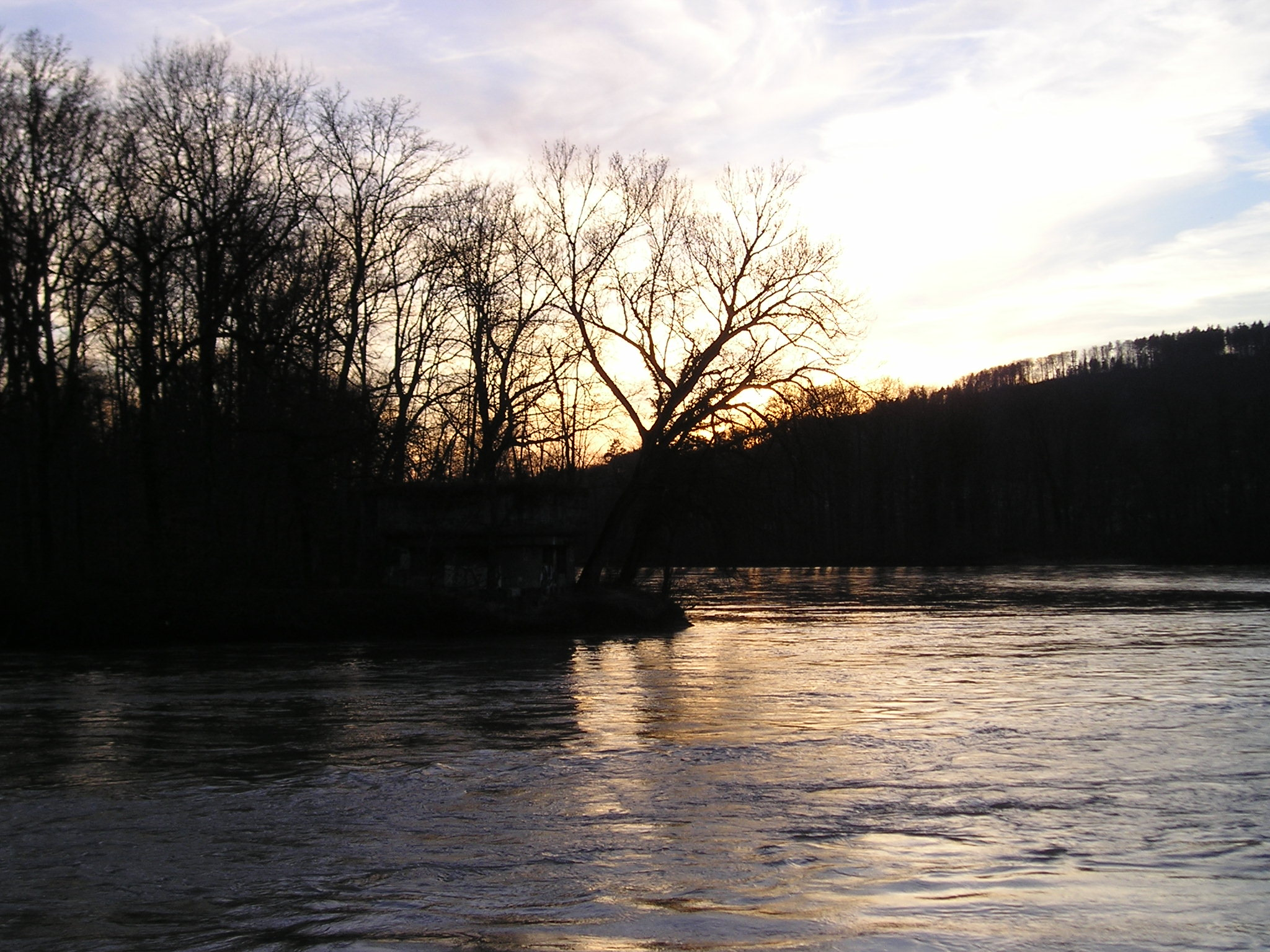 The "Wasserschloss" in Switzerland